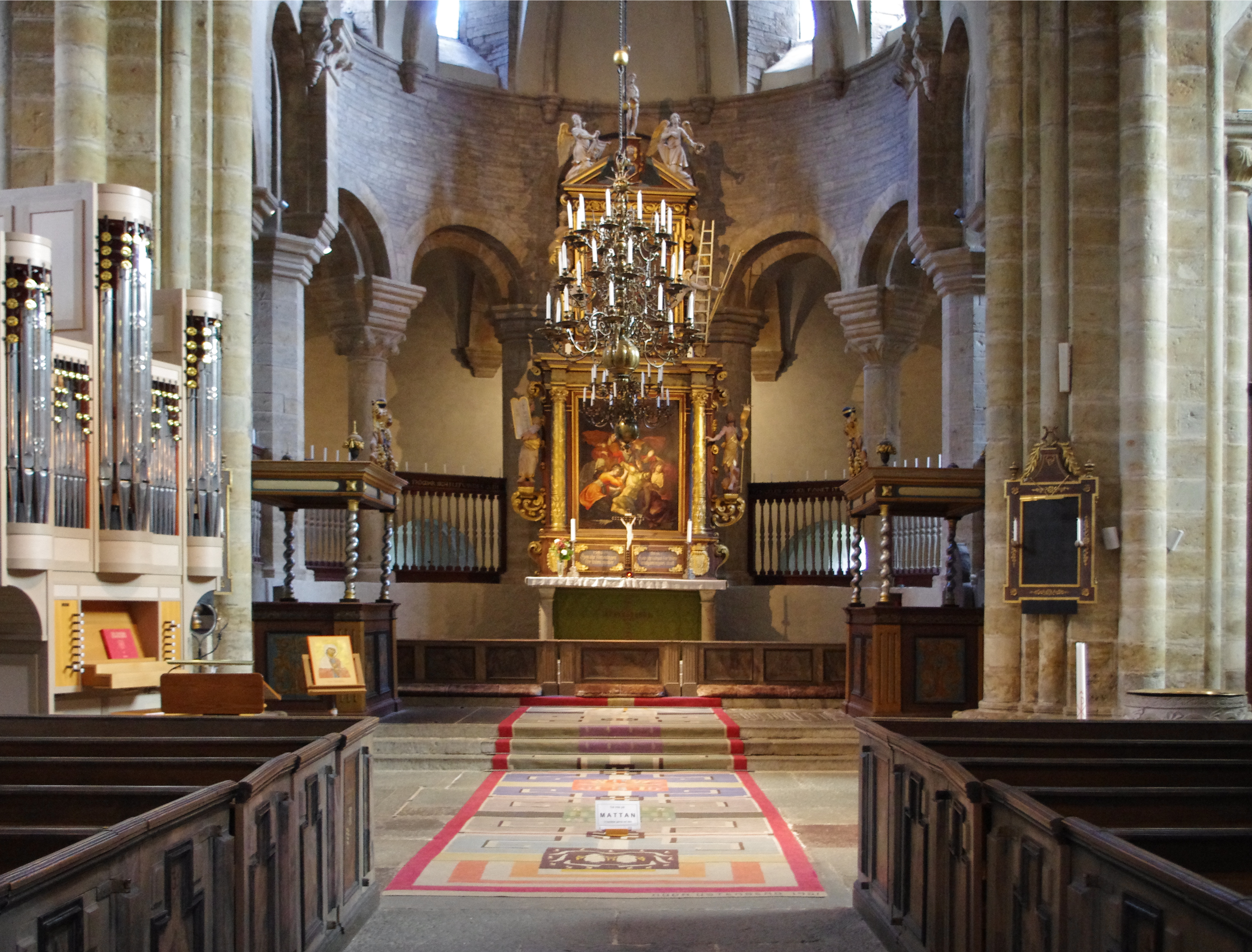 Varnhems klosterkyrka. Interiör.